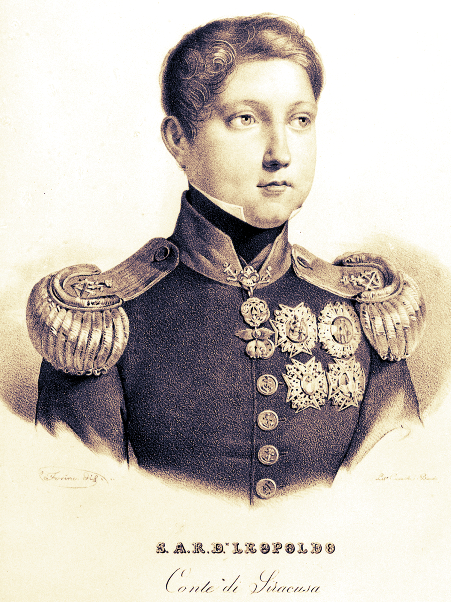 Il conte di Siracusa all'età di 15 anni nel 1828